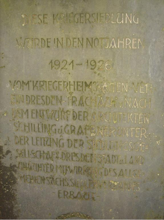 Gedenkstein in der Kriegersiedlung Dresden-Trachau, Aufschrift: Diese Kriegersiedlung wurde in den Notjahren 1921 - 1926 vom Kriegerheimstättenverein Dresden-Trachau nach dem Entwurf der Architekten Schilling u. Graebner unter der Leitung der Siedlungsgesellschaft Dresden Stadt und Land und unter Mitwirkung des Allgemeinen Sächs. Siedlerverbandes -erbaut